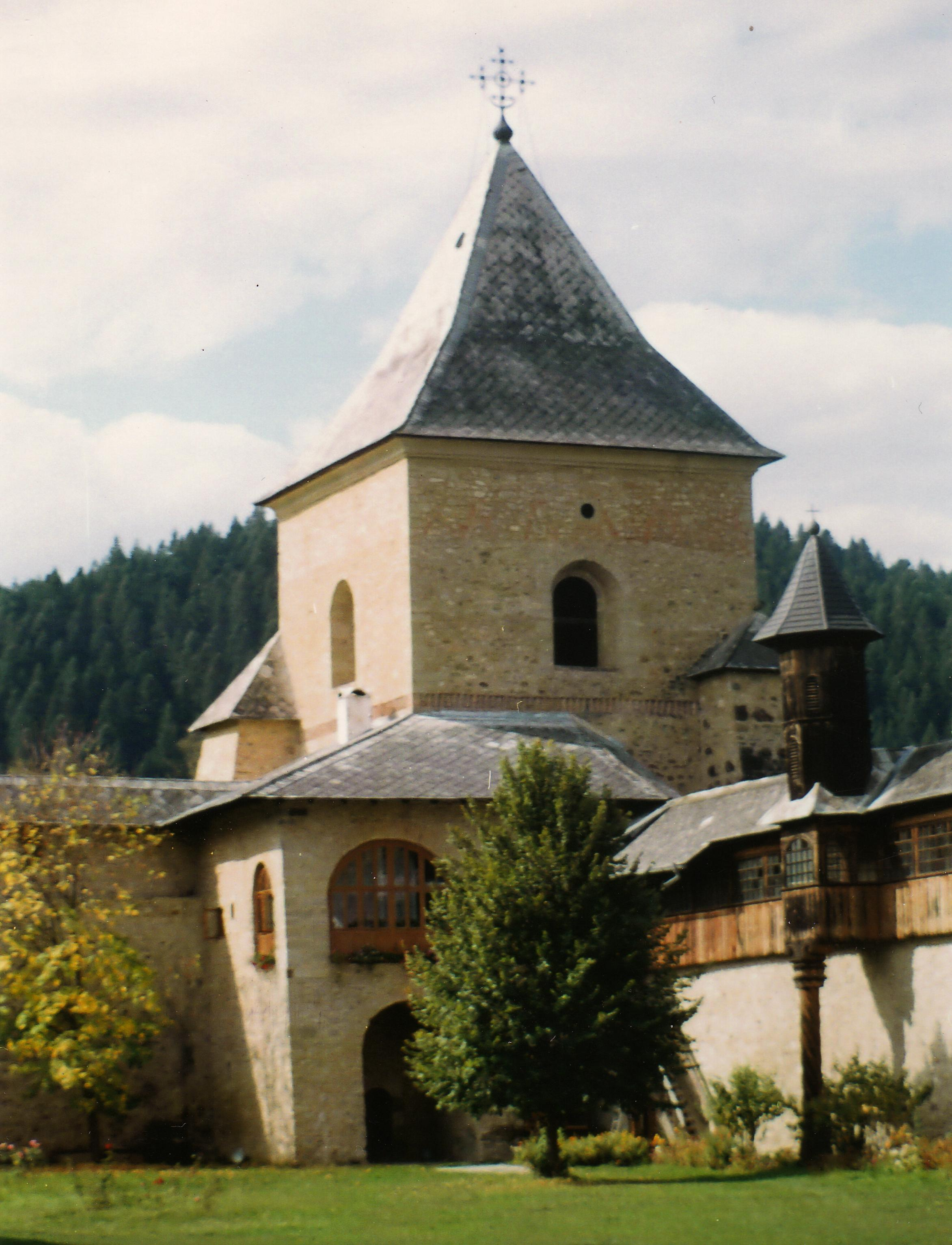 Sucevita kolostoregyüttes: Az északnyugati "harangzó" bástya Licensing Felvétel:Kiss Tamás, 2003.10.02. Kisfilmes CHINON CS4 /50-200-as zoomobj. FUJI SUPERIA 200-as film. Szerkesztés: Kiss Tamás, 2006.12.12. 10/15-ös papirképről CANON Lide 500 N 600 dpi (képkivágás, szinkorr.) Közkincs